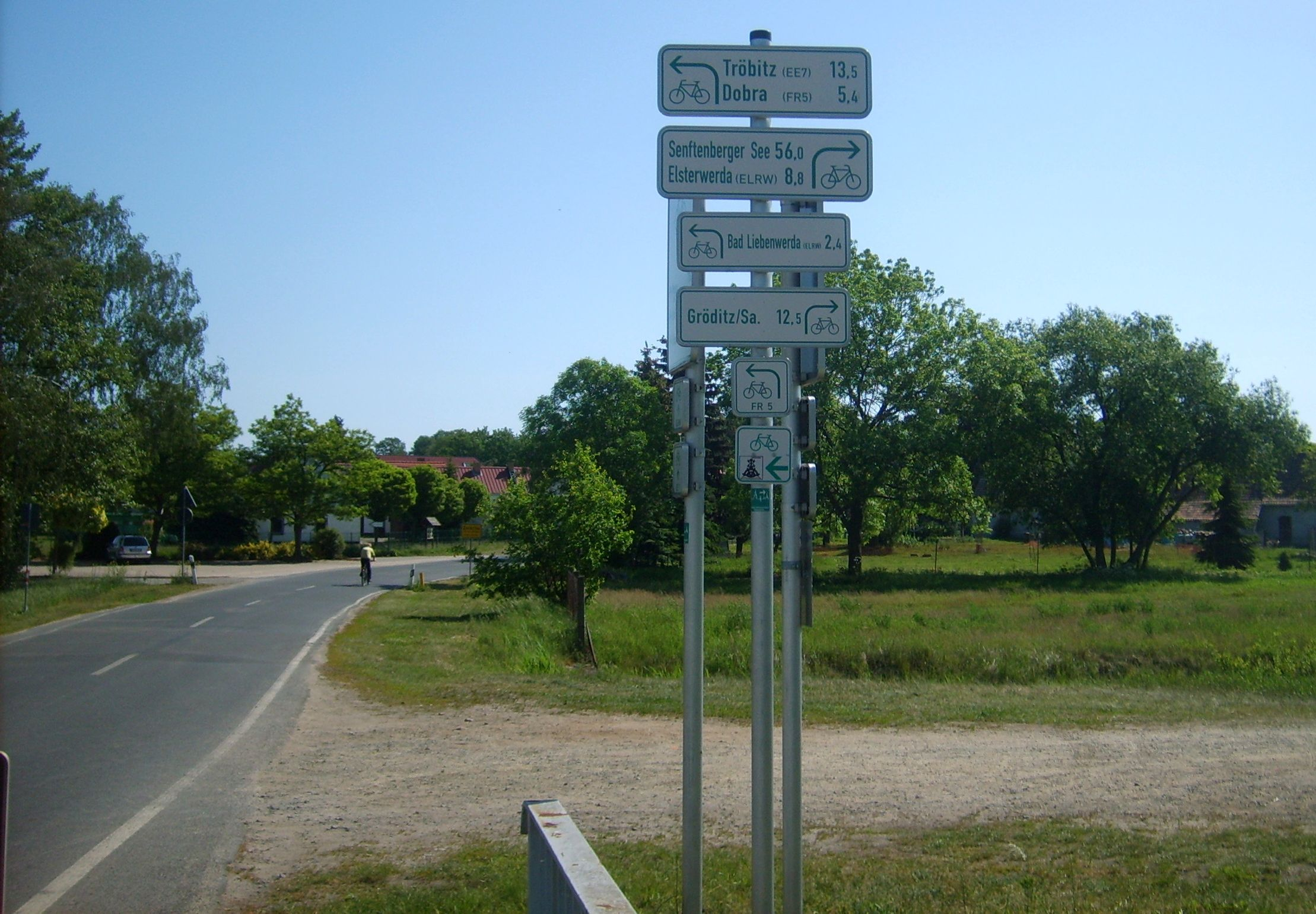 Wegweiser an der Elsterbrücke in Zeischa